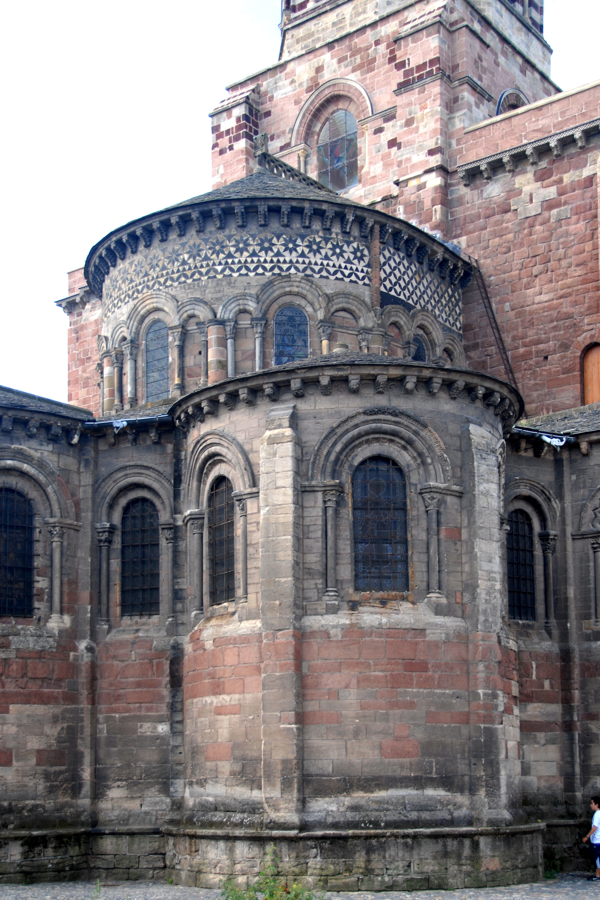 St.-Julien Brioude, Kranzkapelle von N